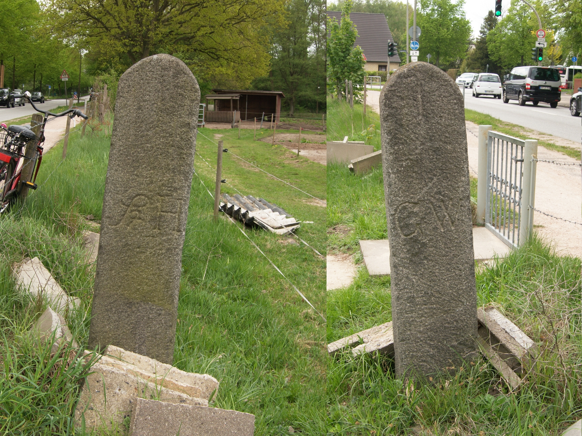 Farmsen Grenzstein am Sonnenweg zwischen GW (Gut Wandsbek) und ST H (Stadt Hamburg)